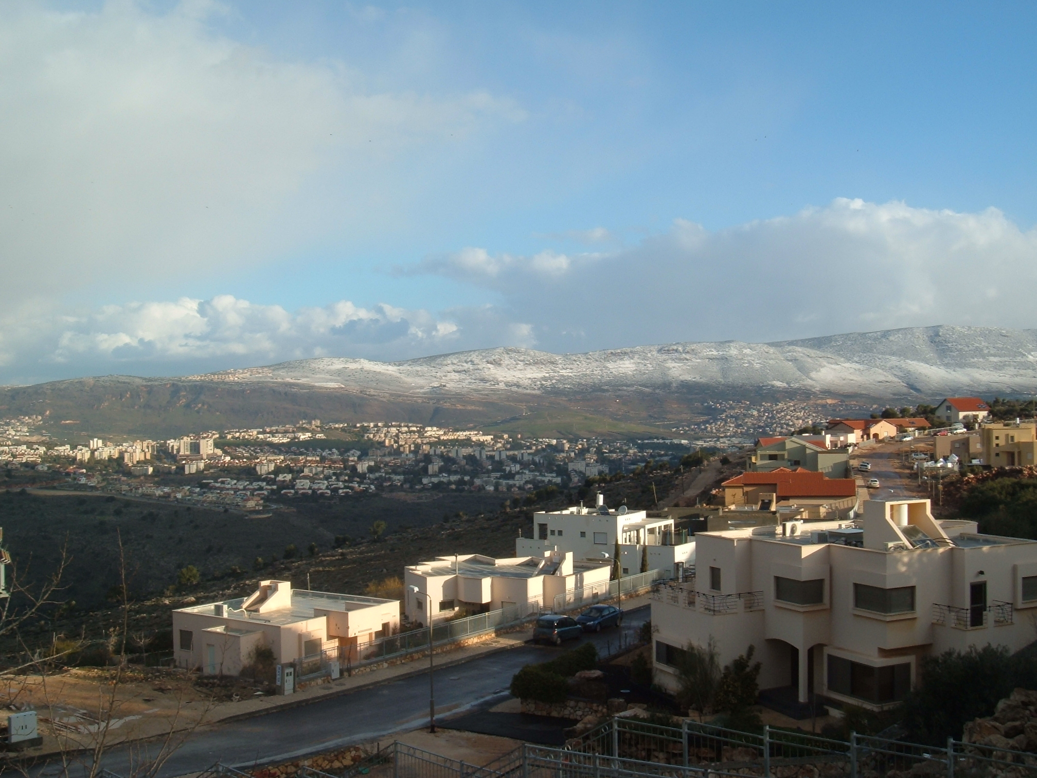 Eshaar, Israel on a snowy day. אשחר ביום מושלג